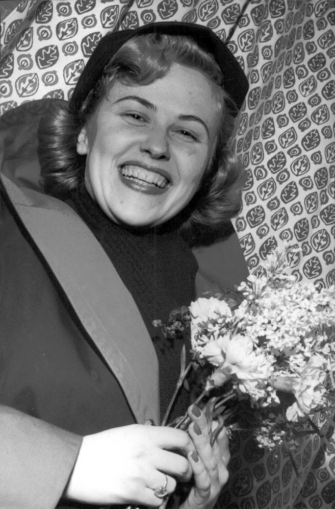 Göteborg den 21/11-51.Glada sångerskan Bibbi Johnsson for på onsdagsmiddagen med SAL:s "Gripsholm" till USA.